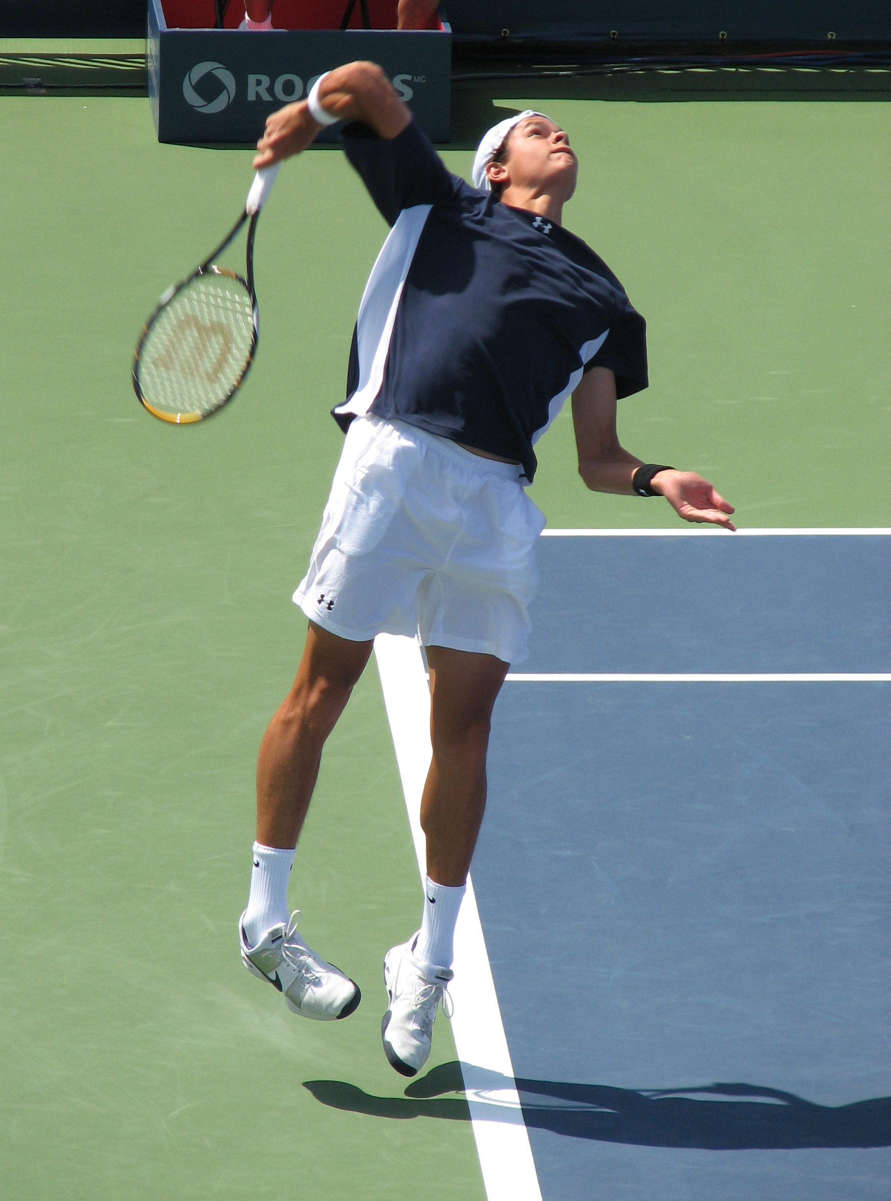 Milos Raonic au Masters du Canada 2009